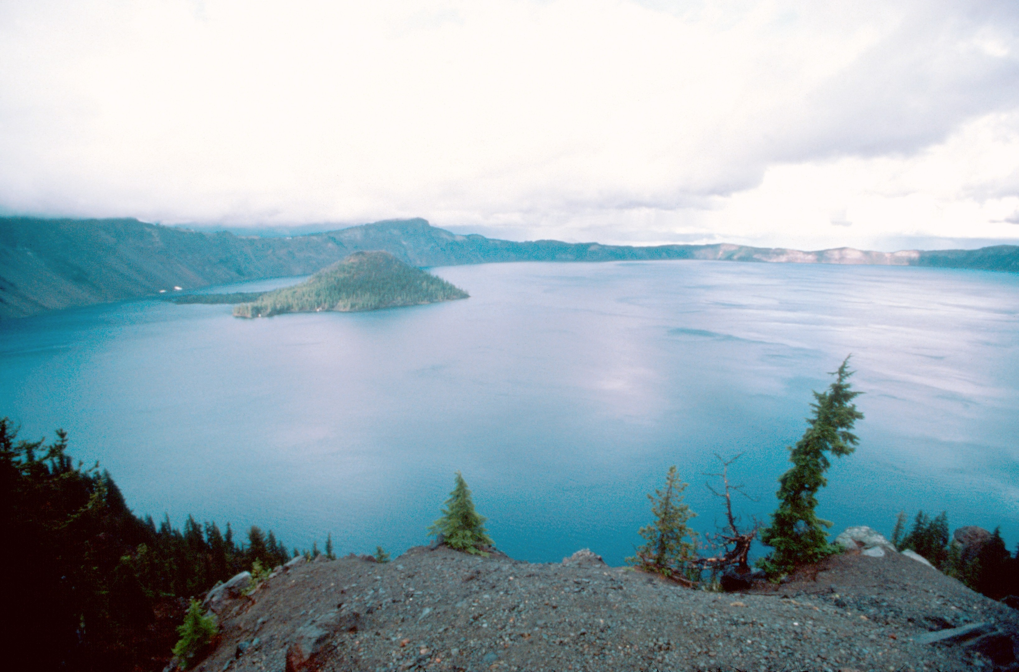 Crater Lake in Oregon, USA